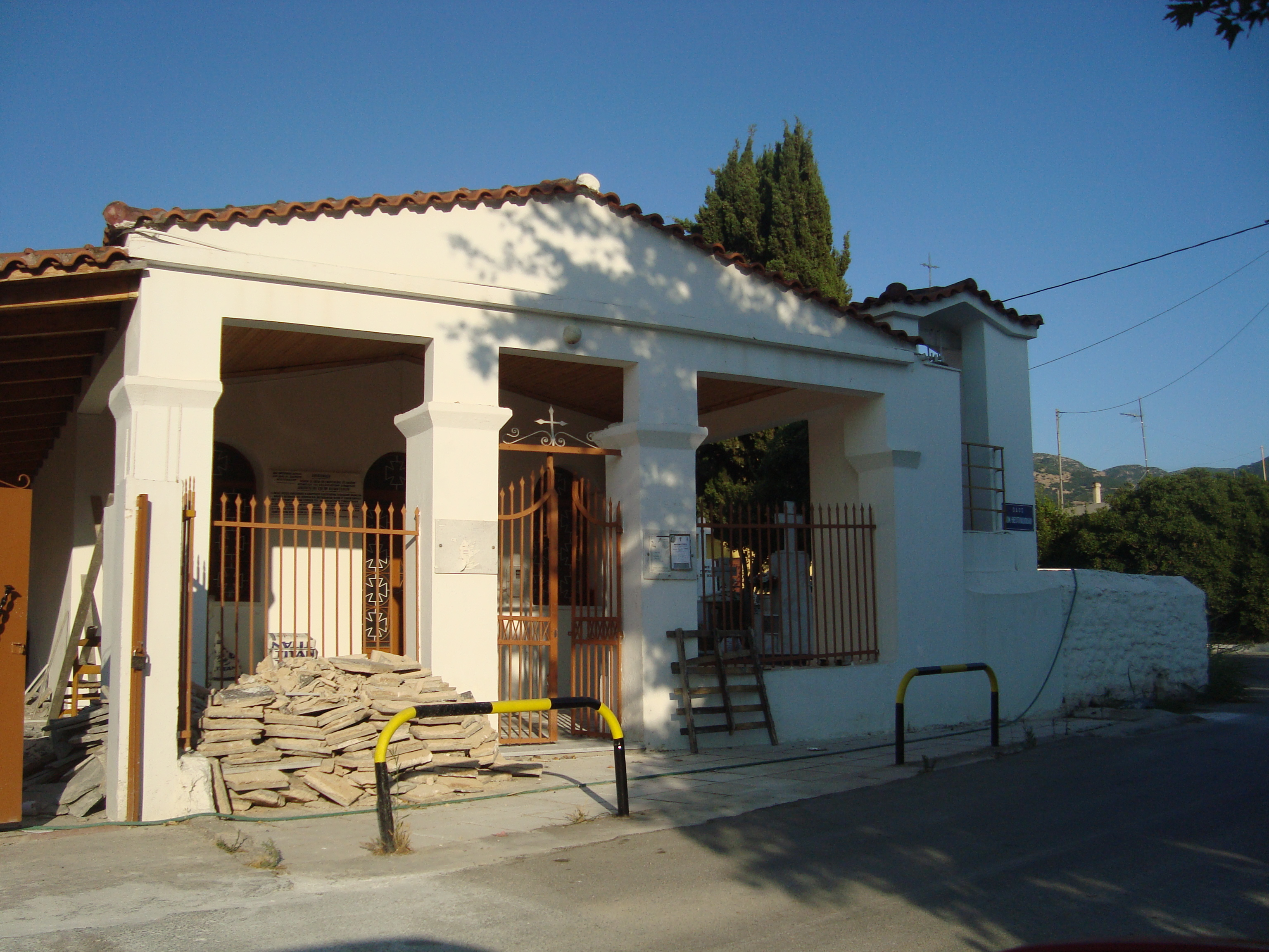 Η εκκλησία των Αγίων Αποστόλων στο Μπεγουλάκι της Πάτρας